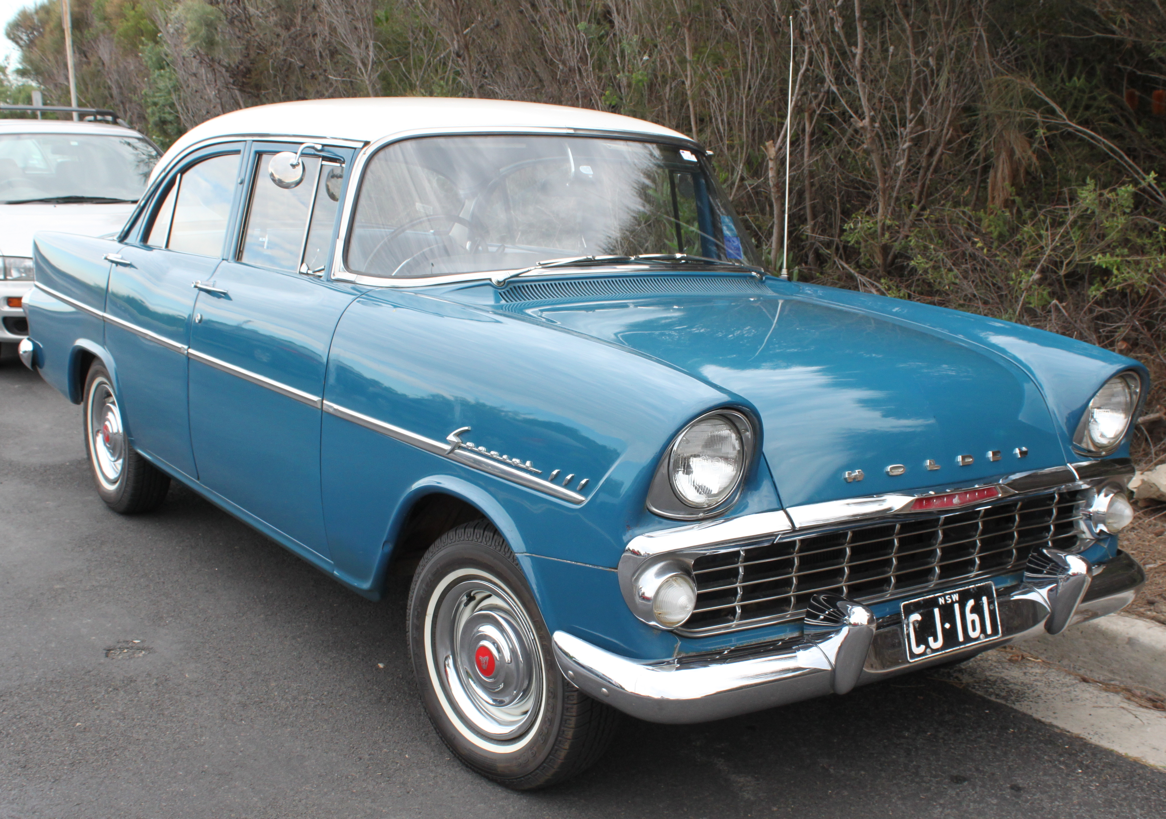 Holden EK Special